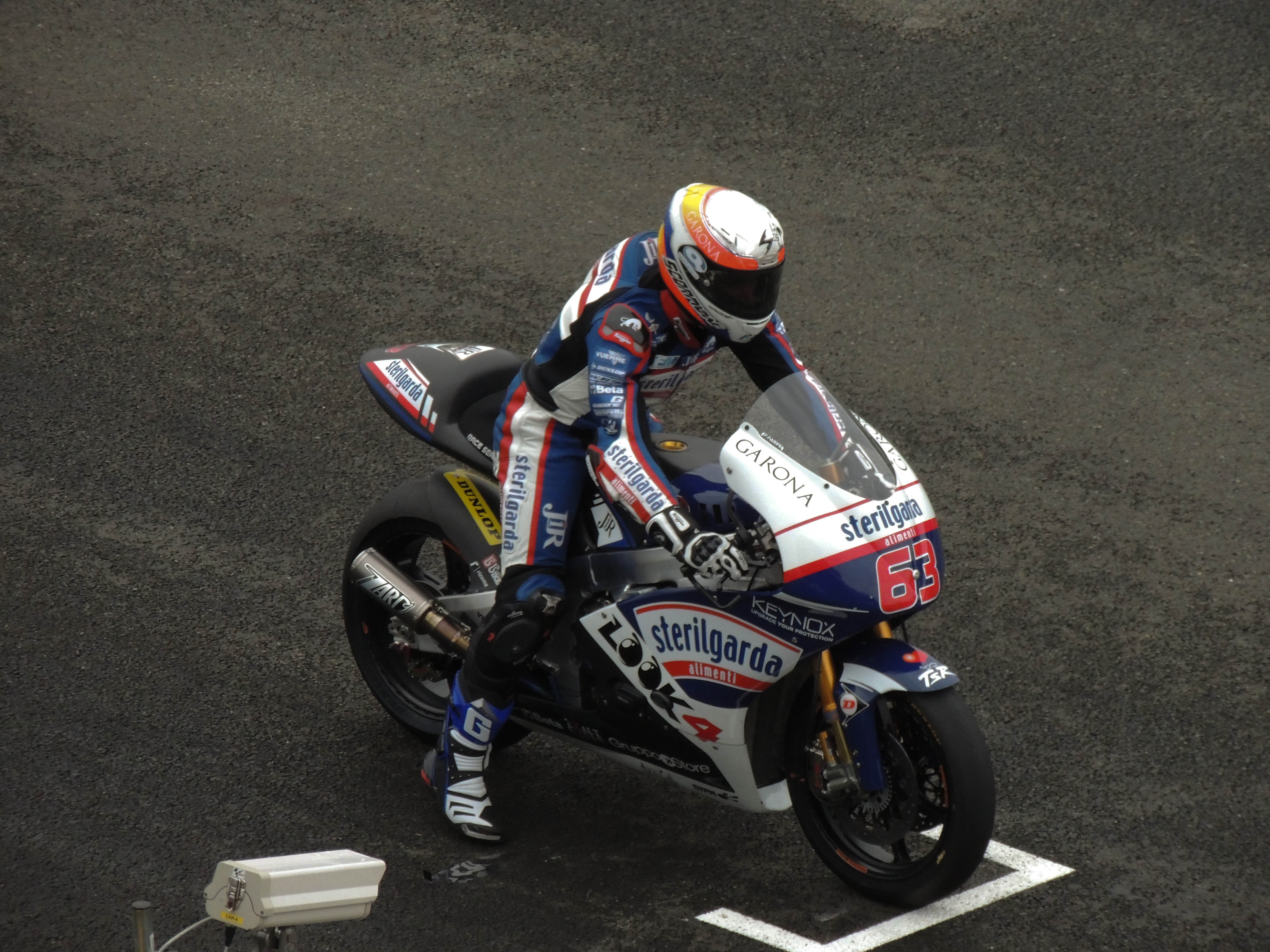 Le français Mike Di Meglio sur la grille de départ.